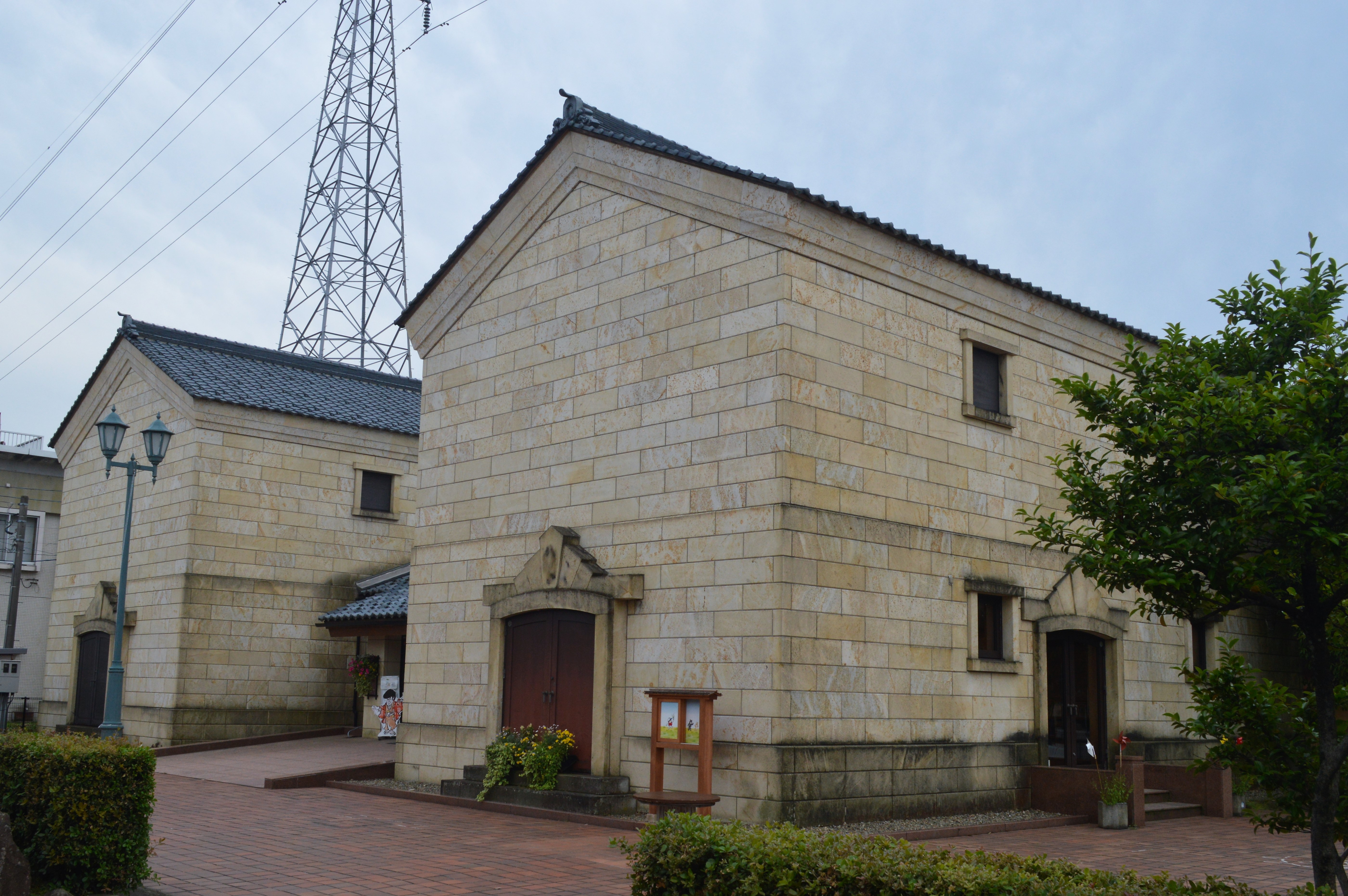 福井県越前市にあるかこさとし ふるさと絵本館「砳」（らく）。